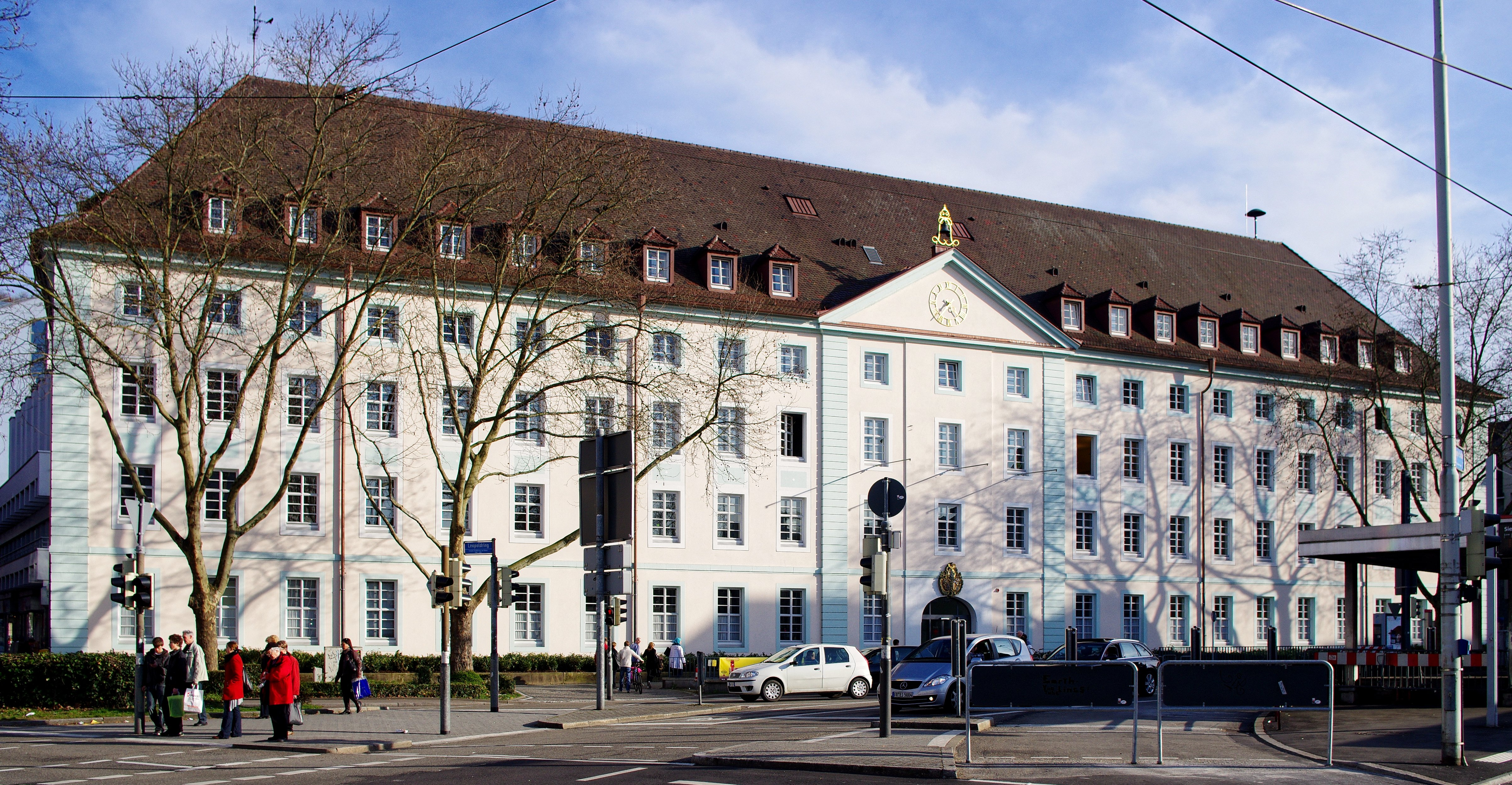 Karlskaserne in Freiburg. Heute Jugend und Sozialamt